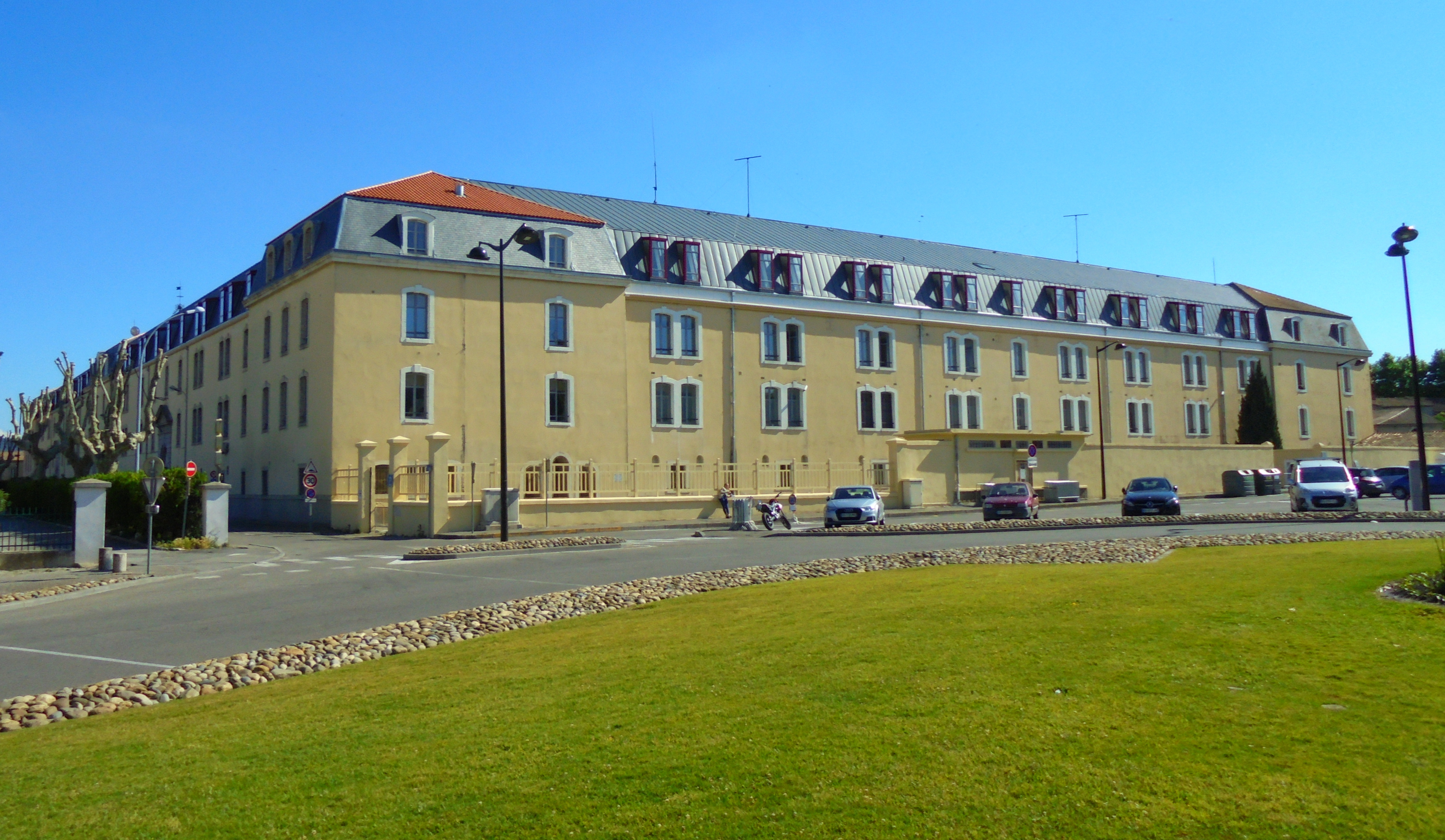 La caserne Laperrine, abritant le 3ème Régiment de Parachutistes d'Infanterie de Marine, après les travaux d'agrandissement en juillet 2019.